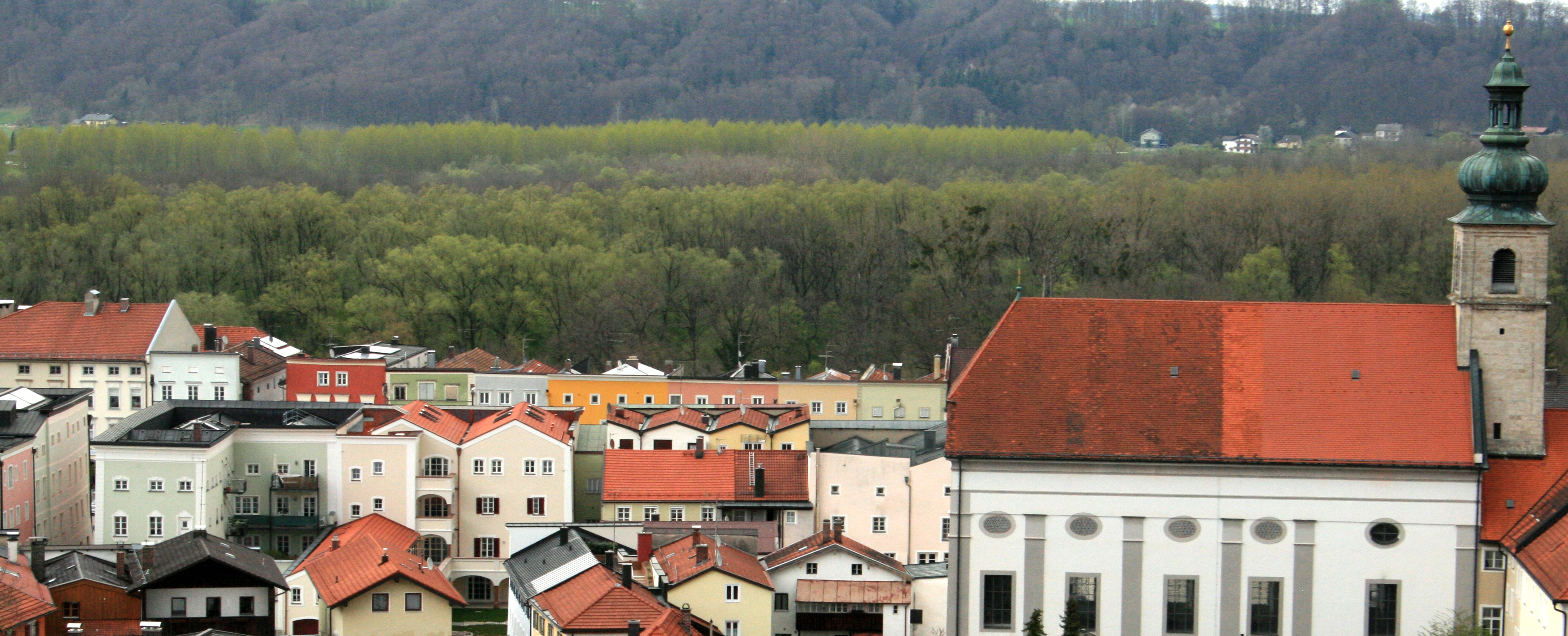 Inn-Salzach-Bauweise am Beispiel des Stadtplatzes von Tittmoning.